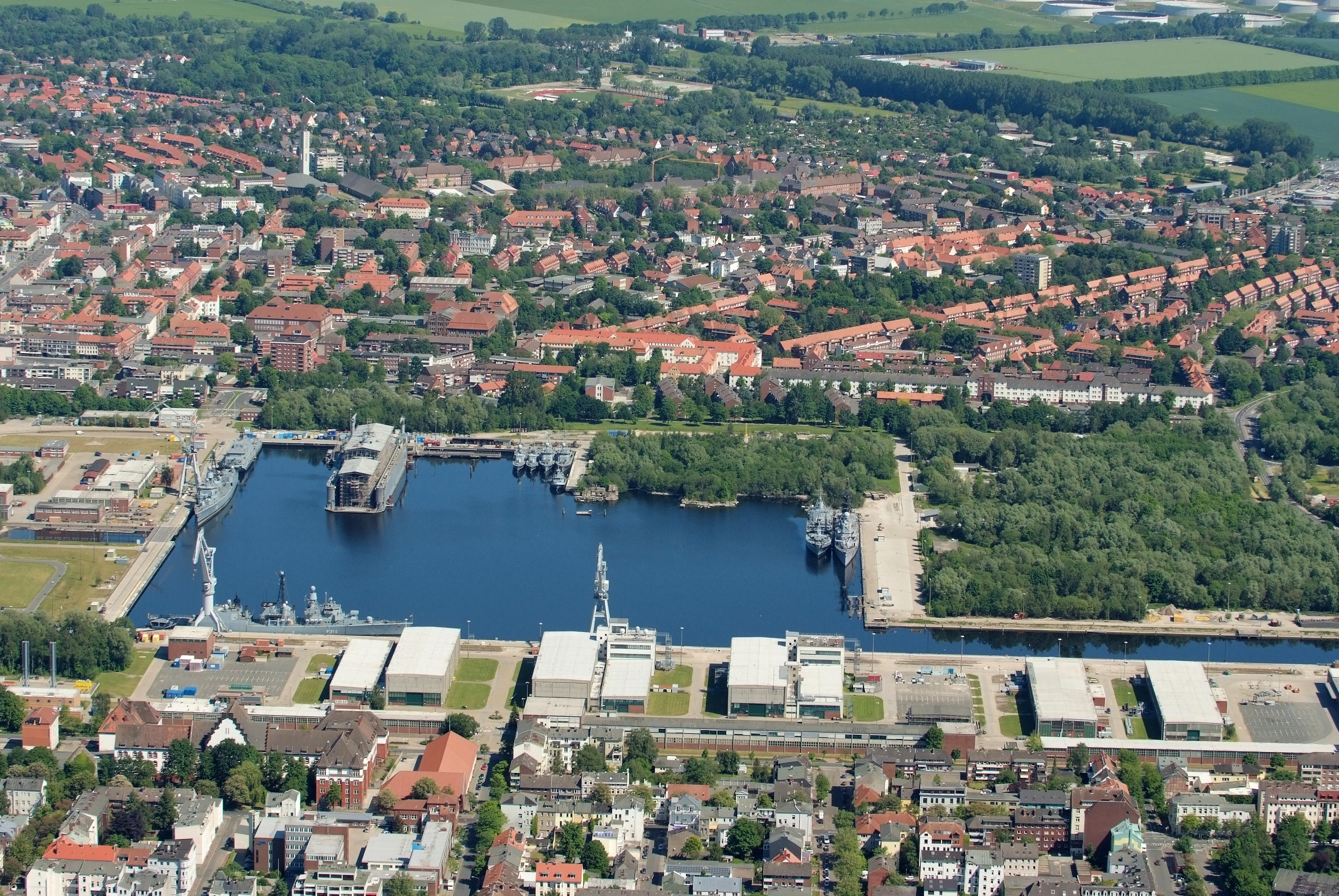 Fotoflug vom Flugplatz Nordholz-Spieka über Cuxhaven und Wilhelmshaven Arsenal Wilhelmshaven mit Arsenalhafen, Blick von Süd